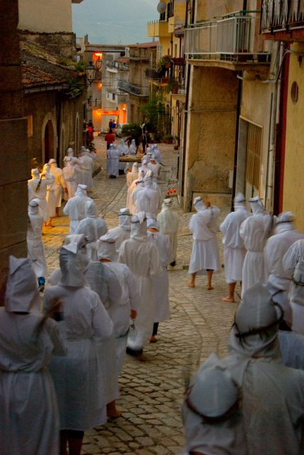 Processione del Venerdì Santo a San Lorenzo Maggiore (BN): i battenti percorrono le strade del centro storico.